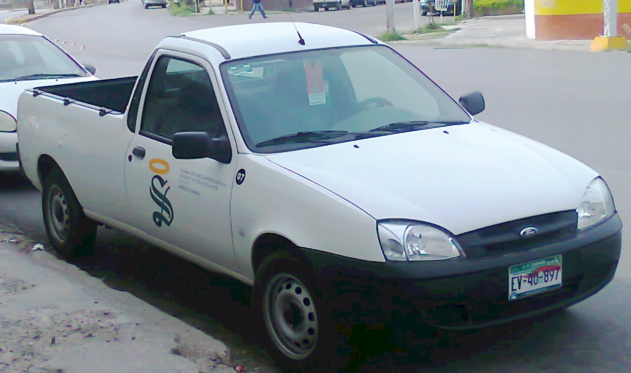 Camioneta del Santos Laguna